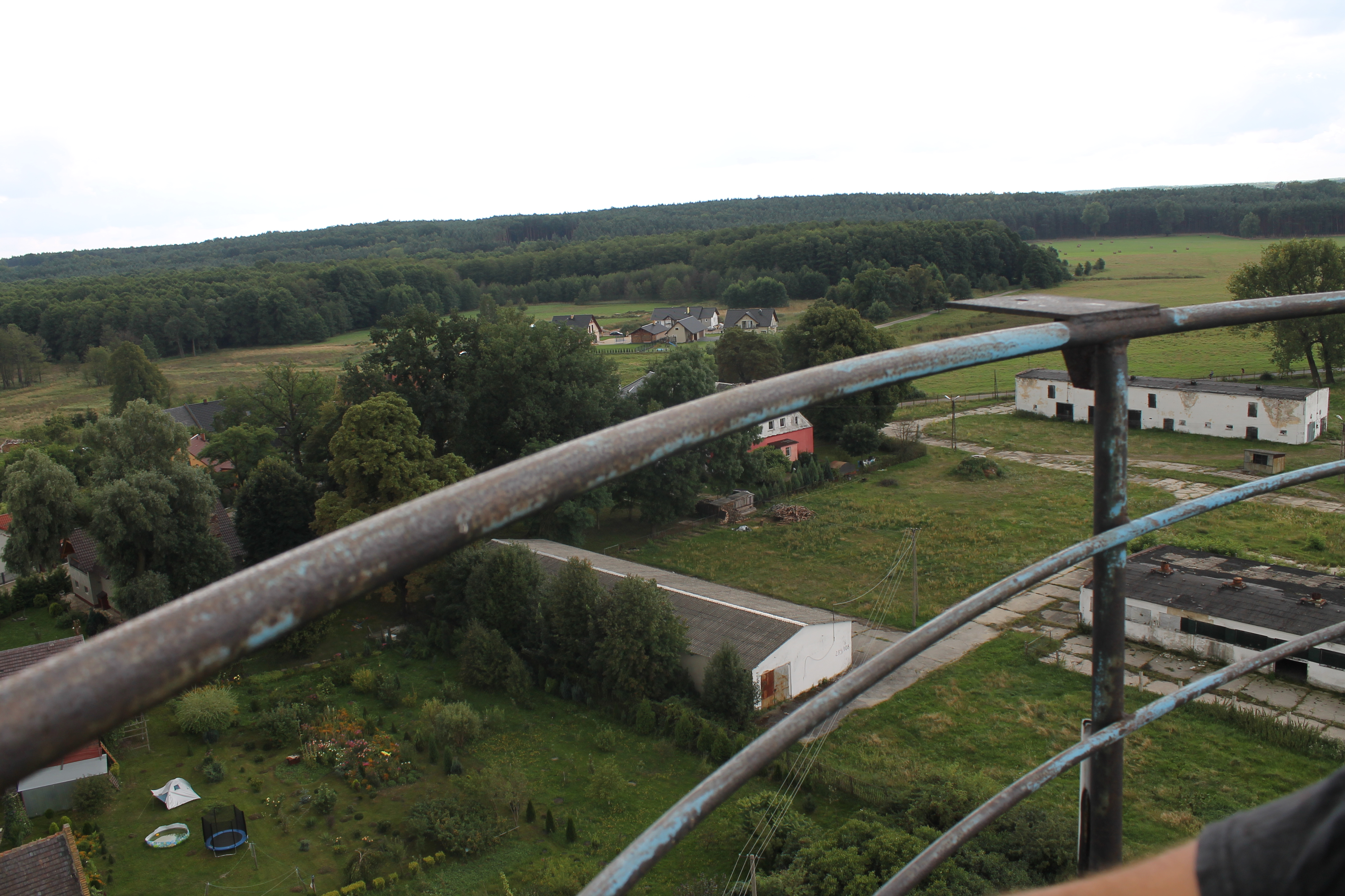 Widok w kierunku Wiciny